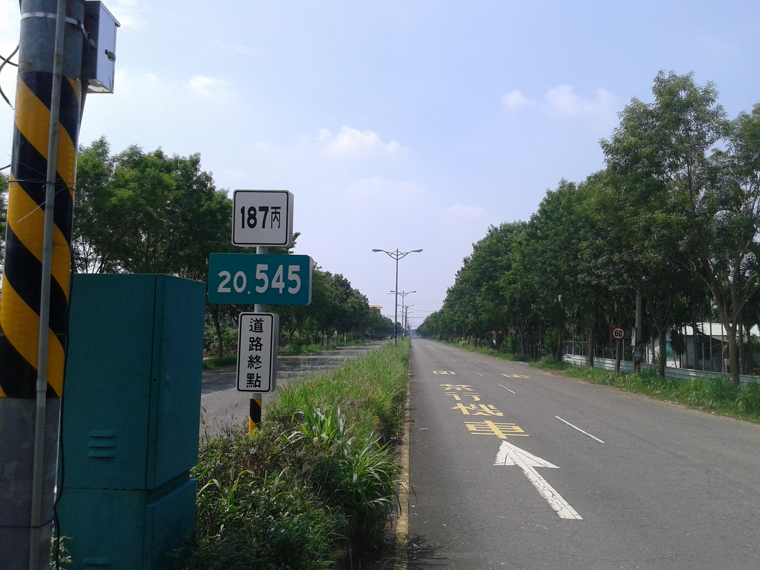 縣道187丙線終點